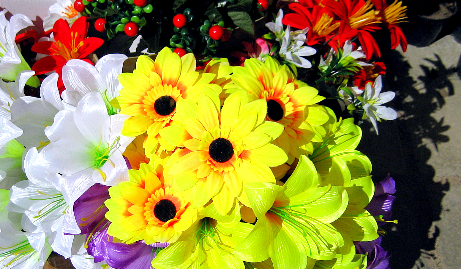 Самодельные цветы. Фото А. Щекинова